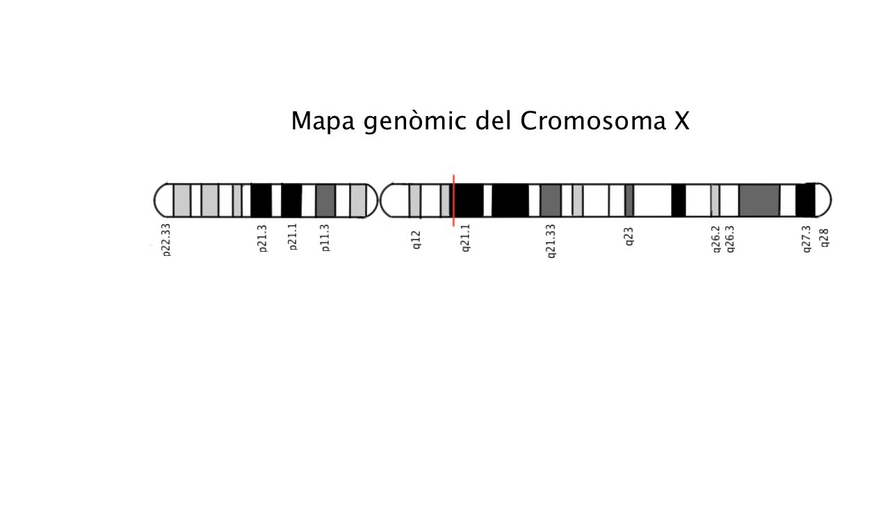 Localització del gen que codifica la proteïna ATP7A diana de diverses mutacions